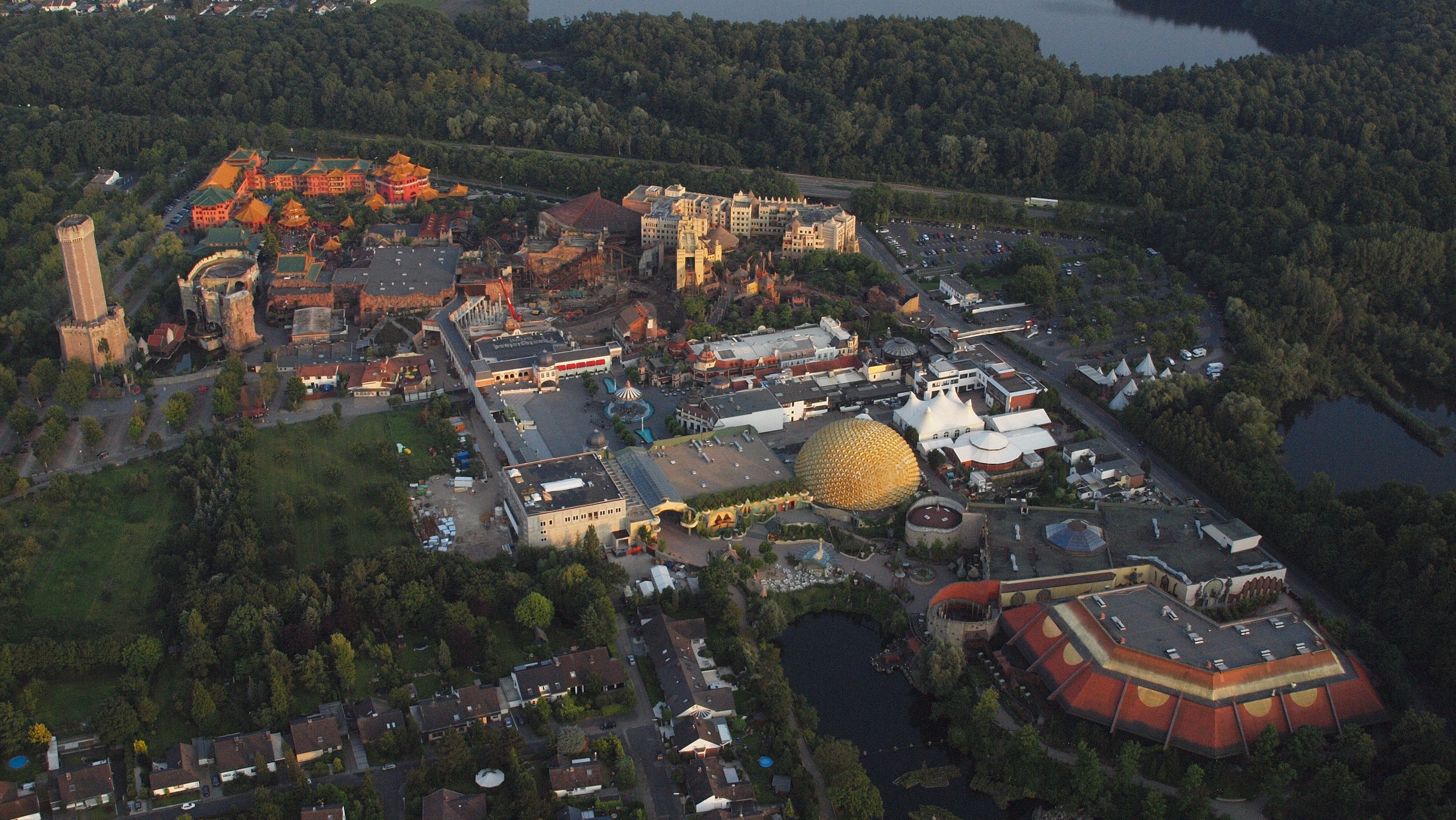 Phantasialand: Luftaufnahme aus nordwestlicher Richtung